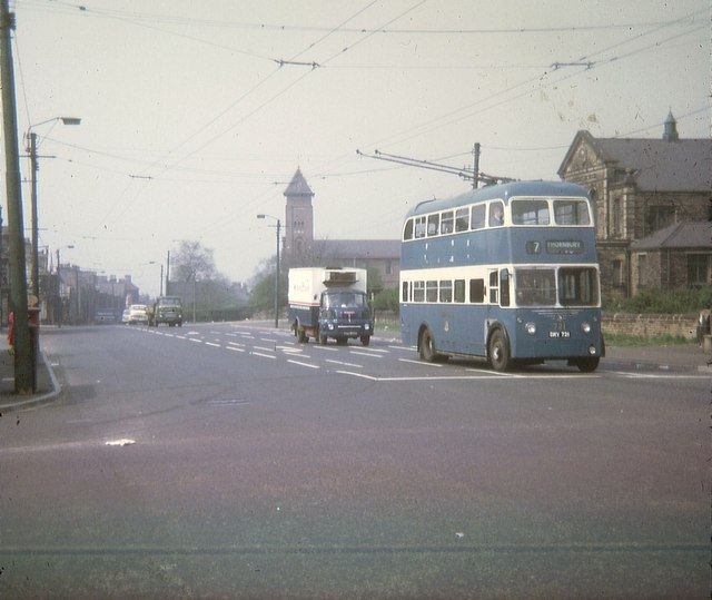 Bradford Trolleybus at Laisterdyke